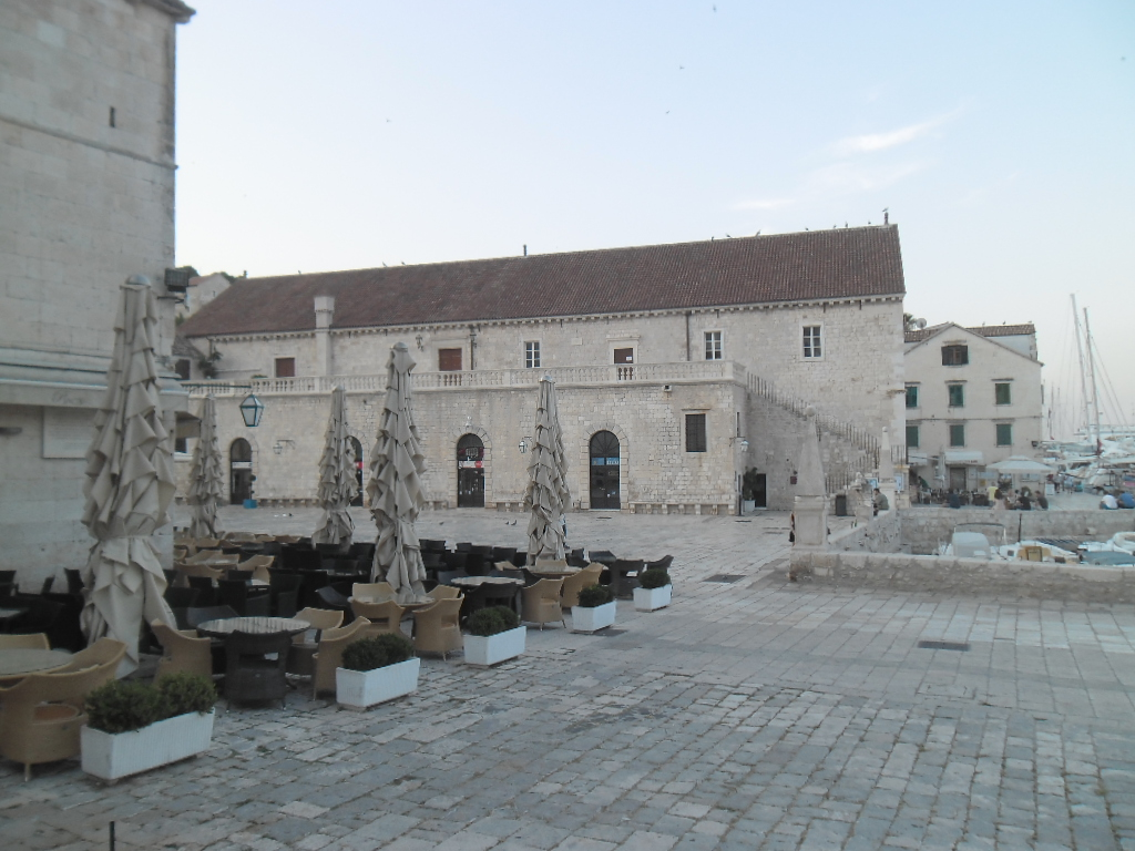 grad Hvar